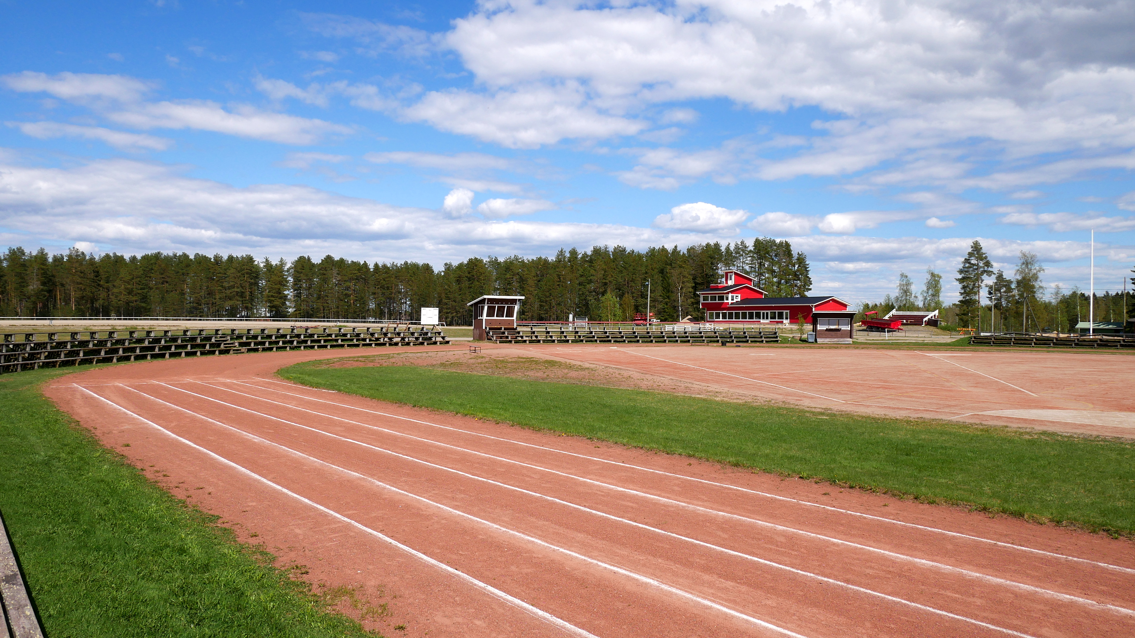 Halsuan urheilukenttä.